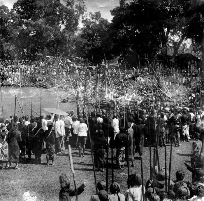 Repronegatief. Een tijgergevecht